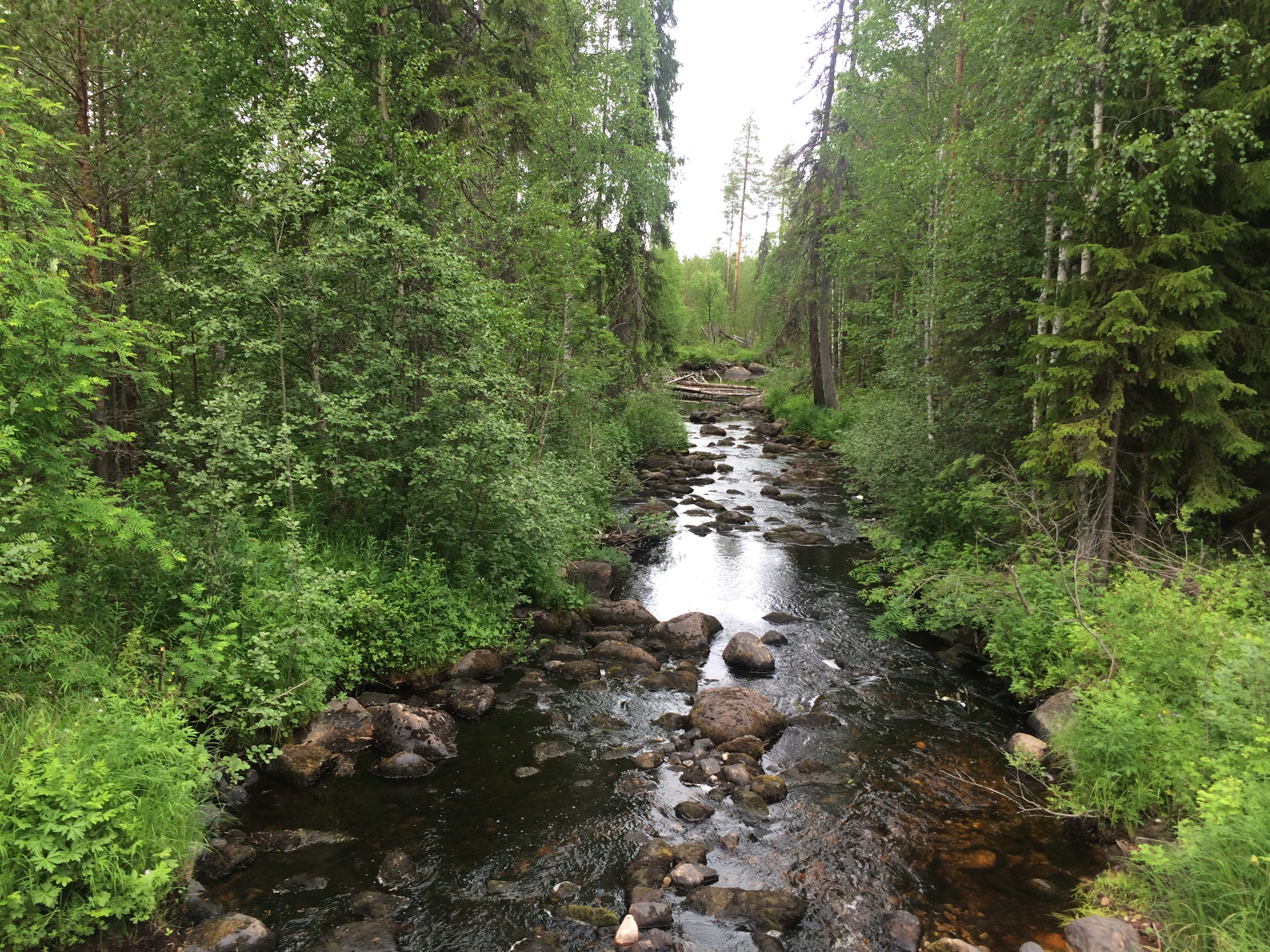 Тянукса (река, впадает в Выгозеро)